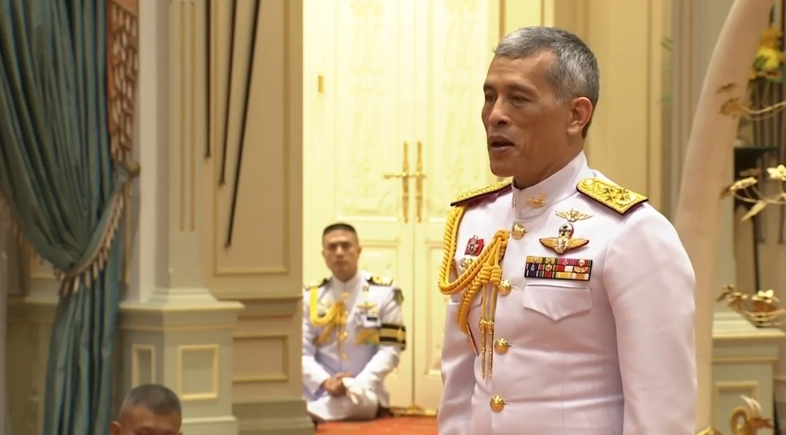 สมเด็จพระเจ้าอยู่หัว พระราชทานพระราชวโรกาสให้คณะบุคคลเฝ้าทูลละอองธุลีพระบาท ณ พระที่นั่งอัมพรสถาน พระราชวังดุสิต